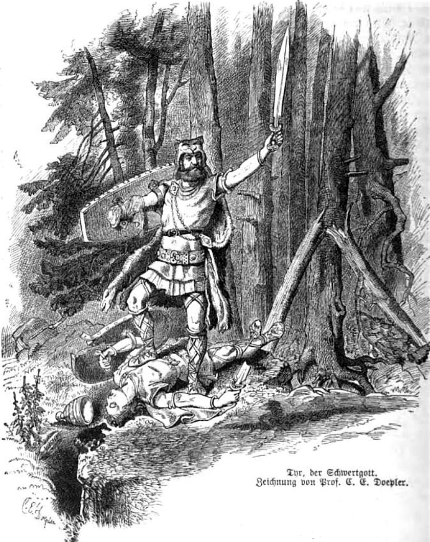 Tyr, der Schwertgott. Týr the sword-god.